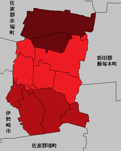 東村の学区。